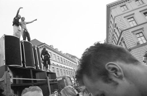 Union Move am 23. Mai 1998 in München auf der Leopoldstraße